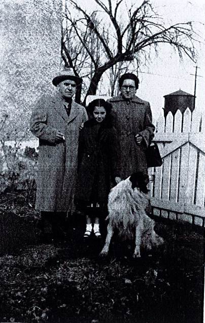 Takolo, esposa e hija.